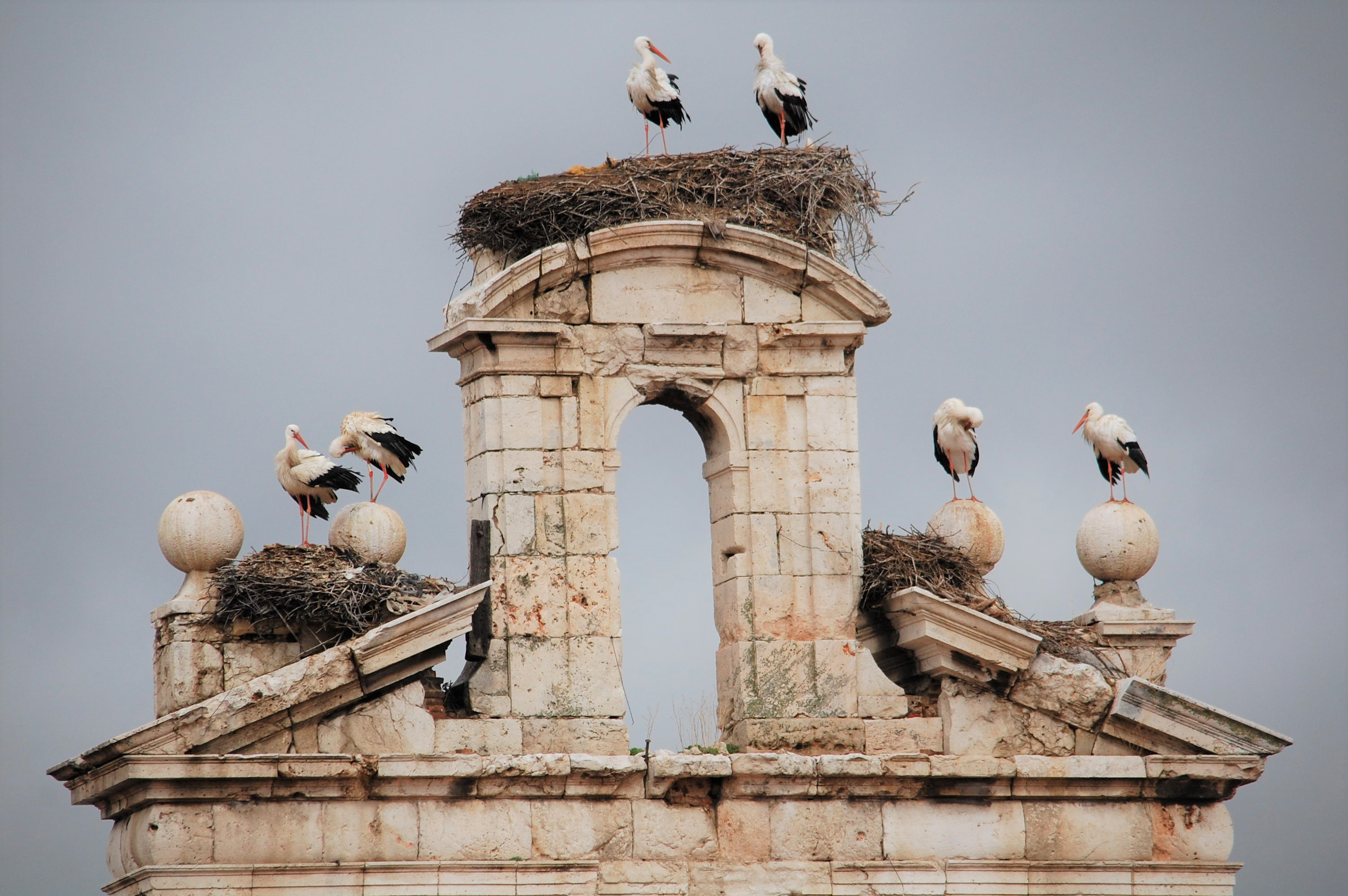 Cigüeñas blancas sobre la espadaña de la Capilla de San Ildefonso en Alcalá de Henares (Comunidad de Madrid - España).